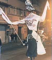 Procesión de día de Muertos en Pueblo Aculco, Distrito Federal. Se realizó en 1999.